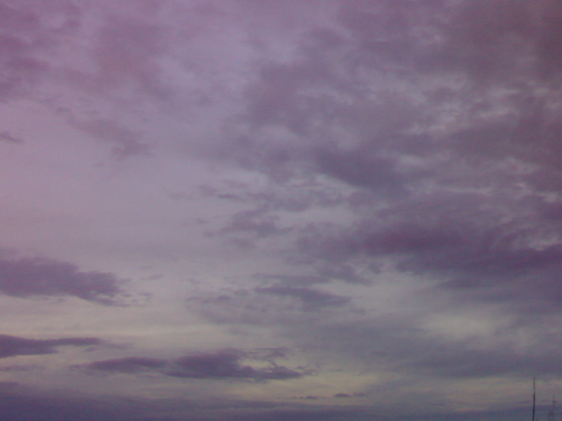 fabrizio_xx